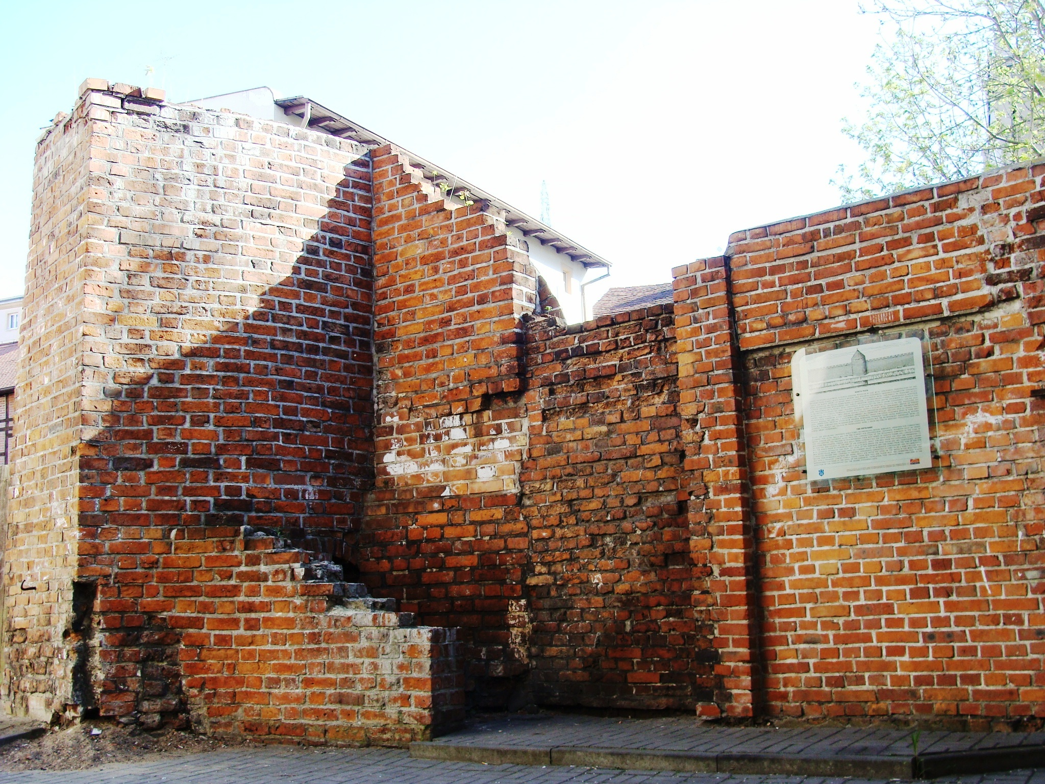 Bydgoszcz, mury miejskie (fragmenty), XIV/XV